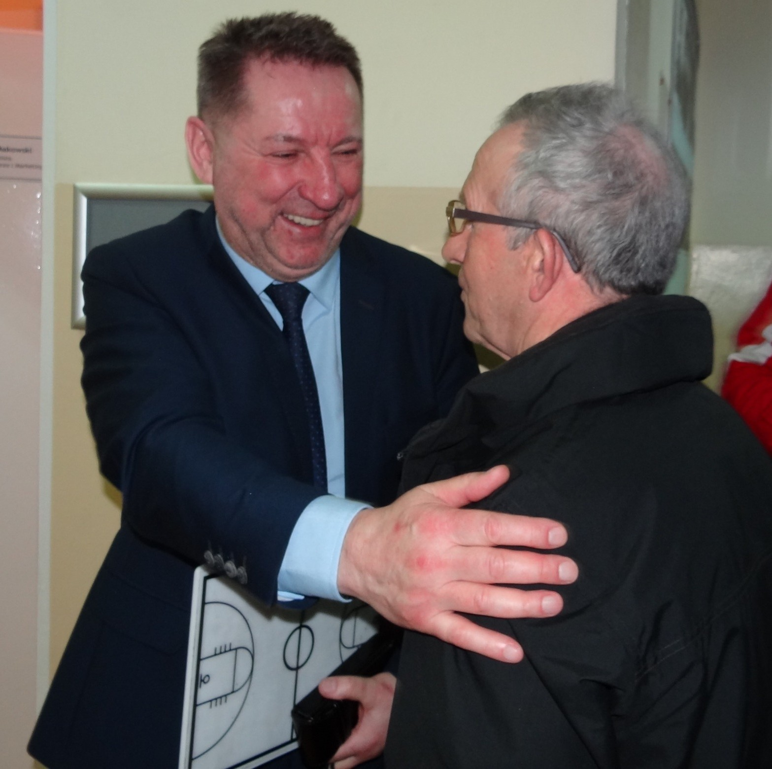 Jubileuszowe gratulacje od Ryszarda Janika dla Krzysztofa Koziorowicz, 24.03.2018